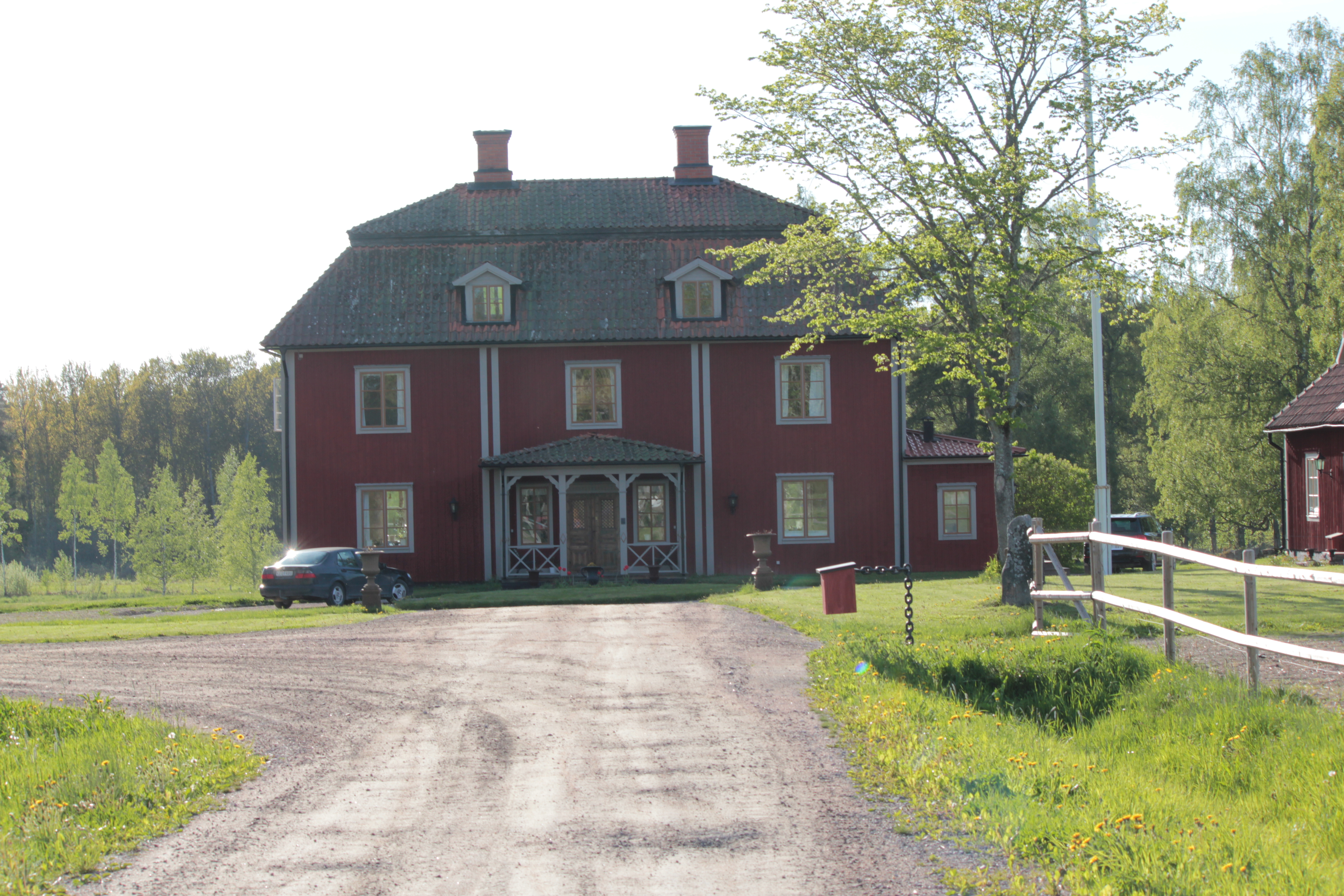 Hadeholm, Gävle kommun. Foto uppladdat som en del i Bergslagssafarin 26 maj 2012.